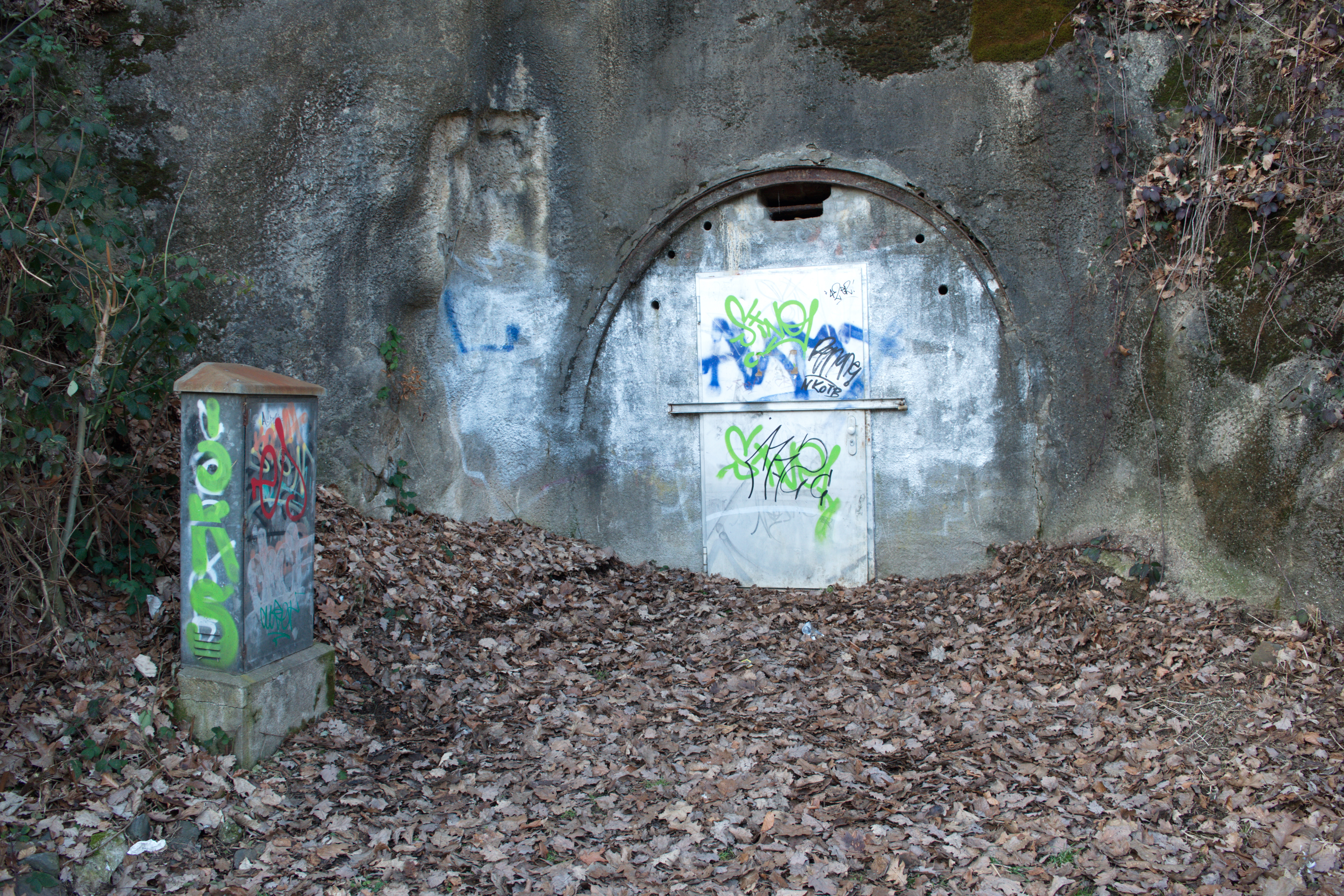 Hardtufer, Wuppertal